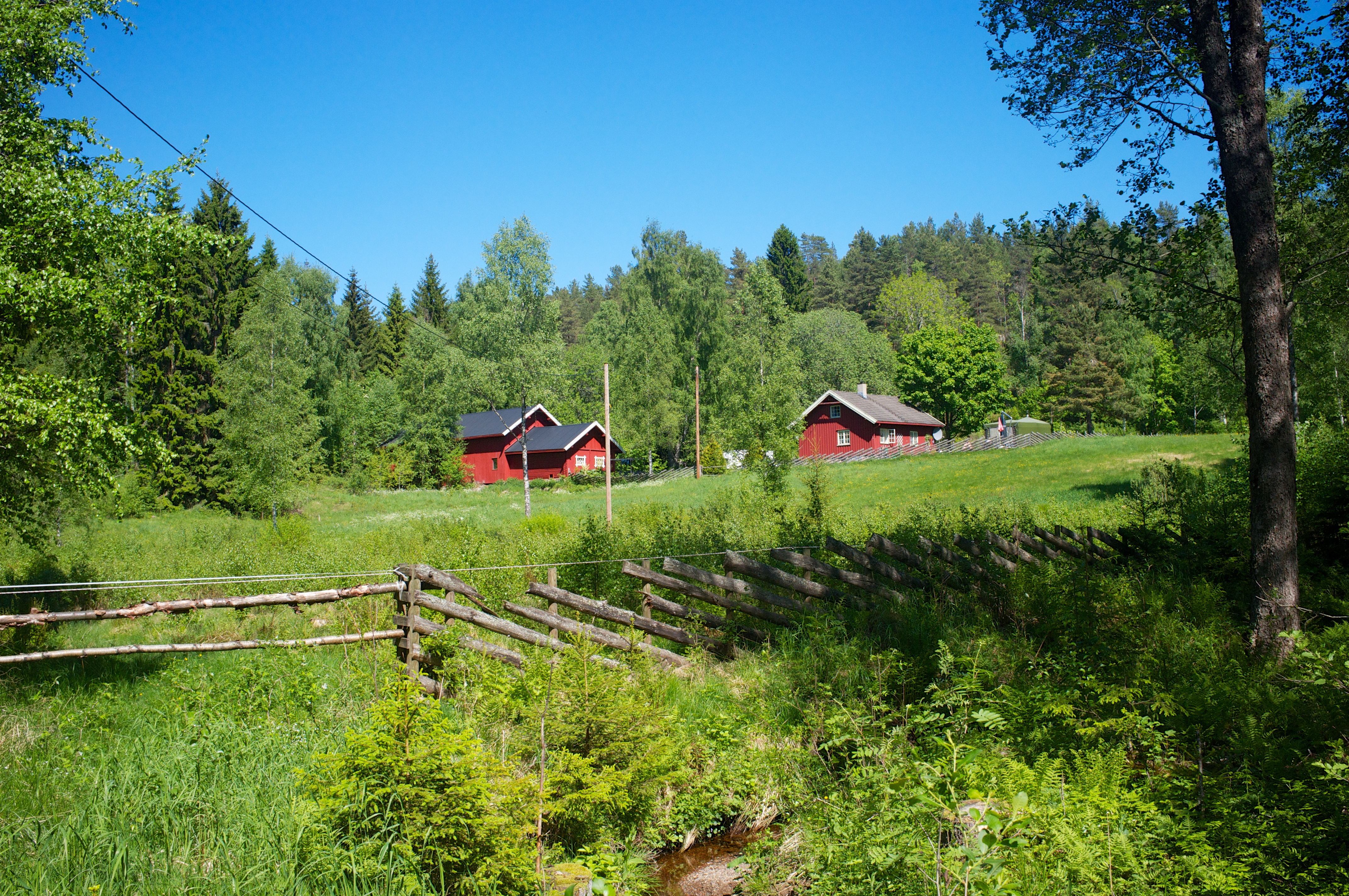 Øgården i Østmarka i Oslo.